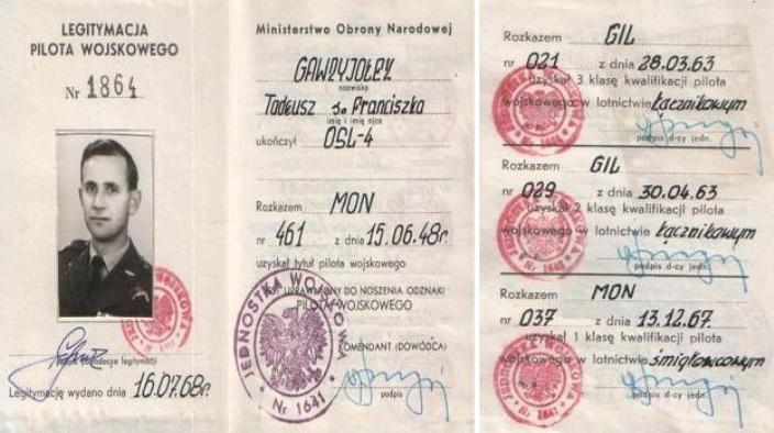 Legitymacja mjr pil. Tadeusza Gawryjołka